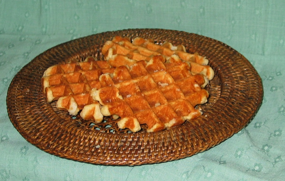 Walon: Des wåfes di Lidje